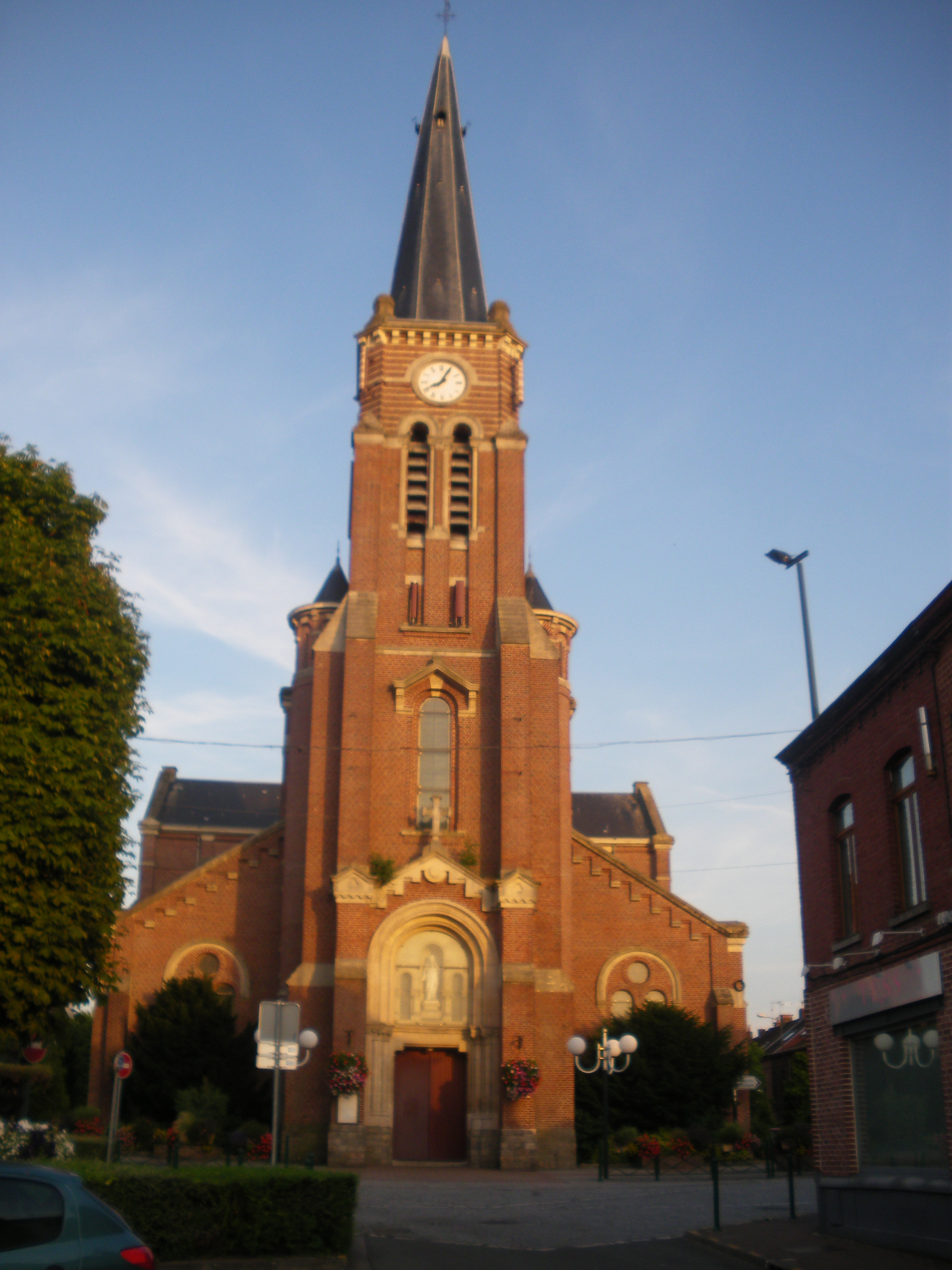 Vue de l'église Saint-Germain de Mouvaux dans le département du Nord.